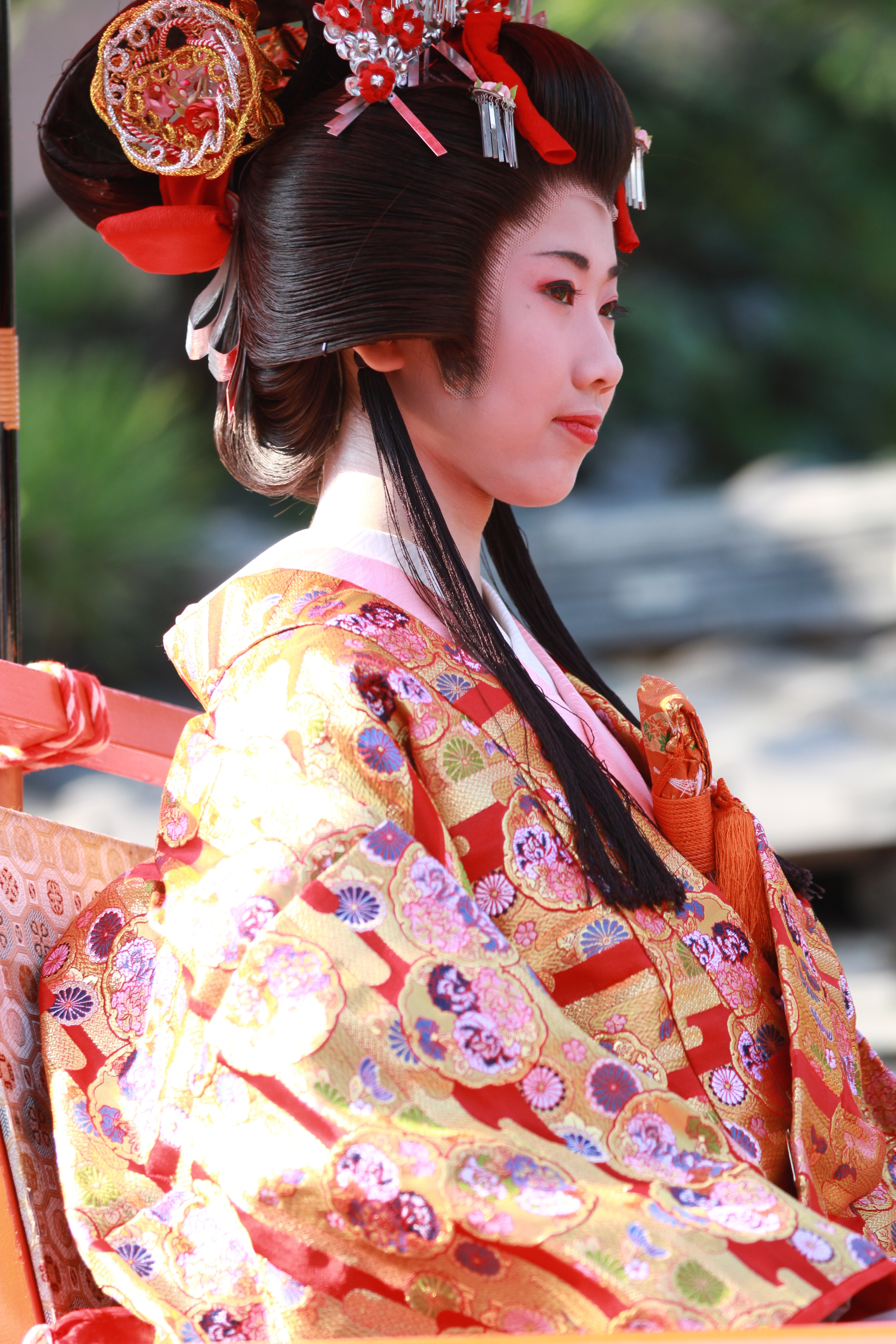 赤坂宿まつり (岐阜県大垣市赤坂町)